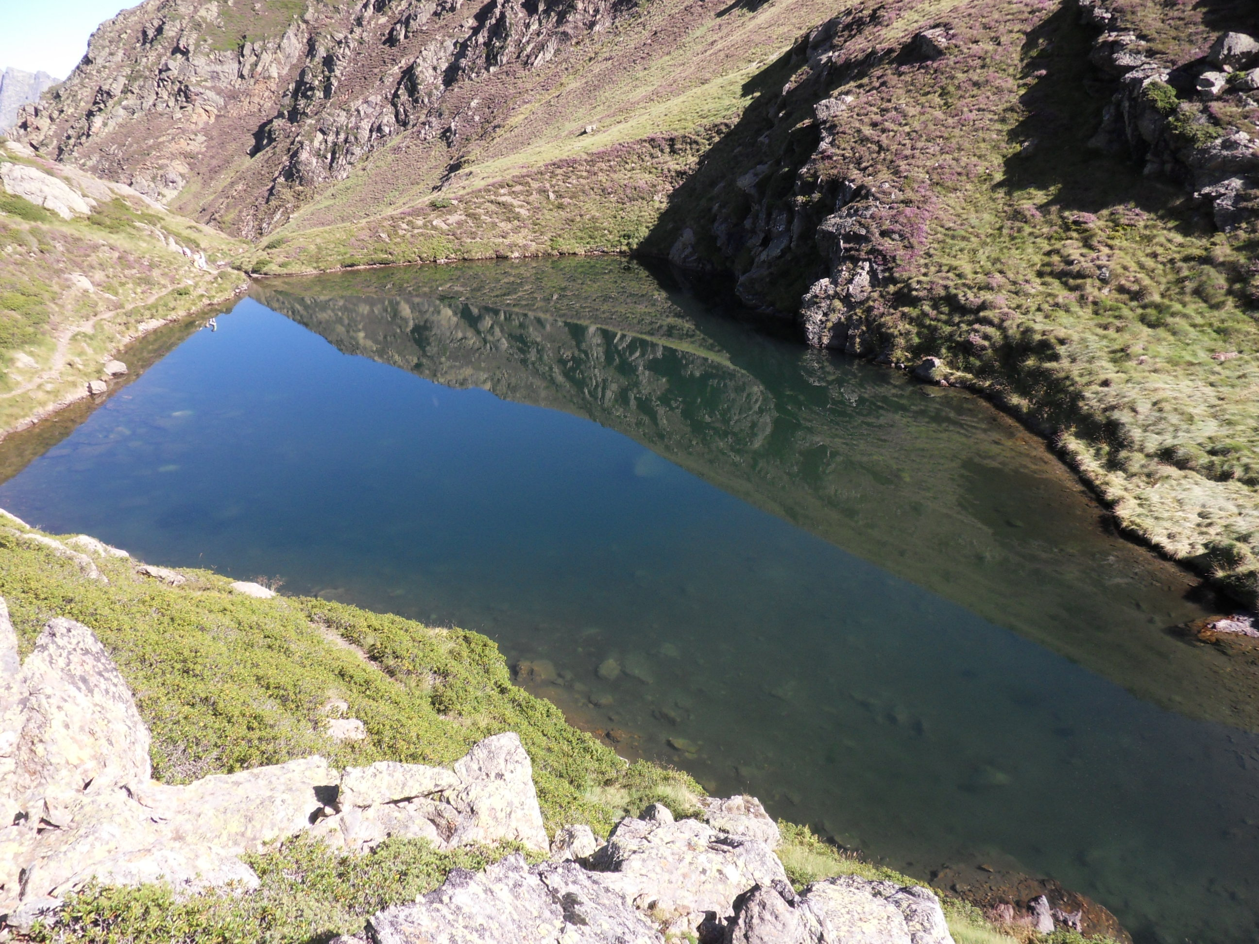 Premier étang du Picot 2040m